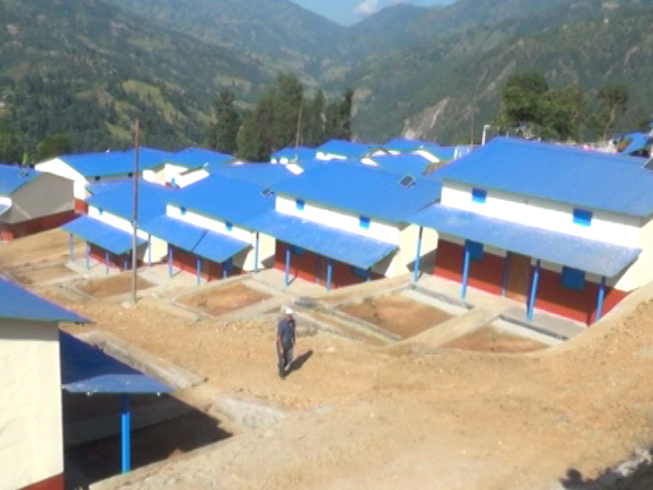 नेपाली: गिरान चौर एकीकृत नमूना बस्ती